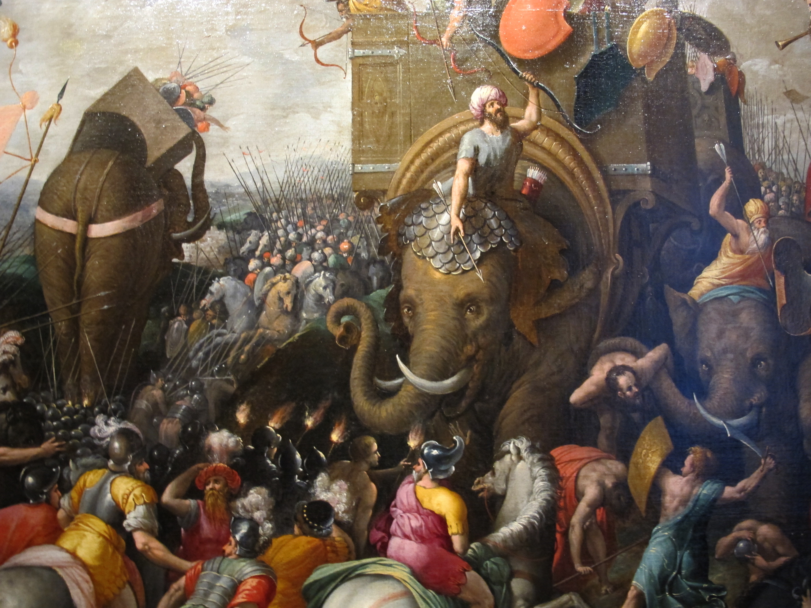 Arista romano, battaglia di zama, 1570-1600 ca